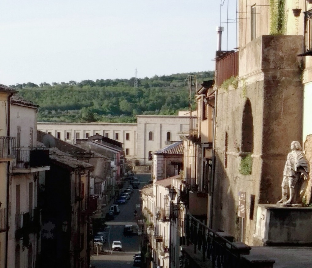 Veduta di Girifalco da piazza Umberto I a piazza Vittorio Emanuele II